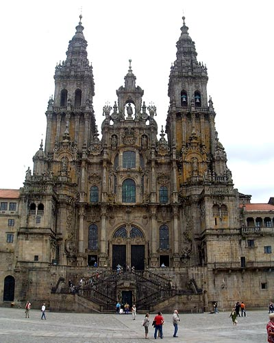 Westwerk der Pilgerkirche in Santiago de Compostela (Galicien, Spanien)